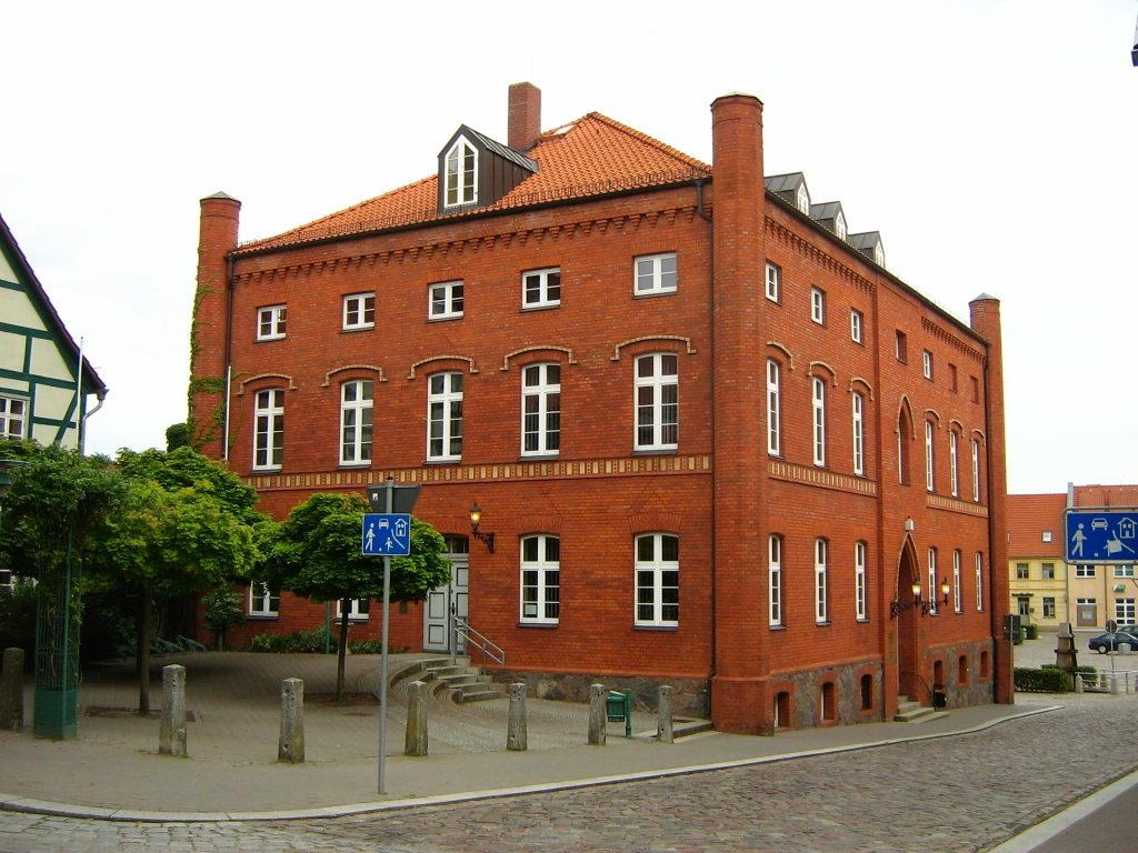 Rathaus in Altentreptow im Landkreis Demmin, Mecklenburg-Vorpommern